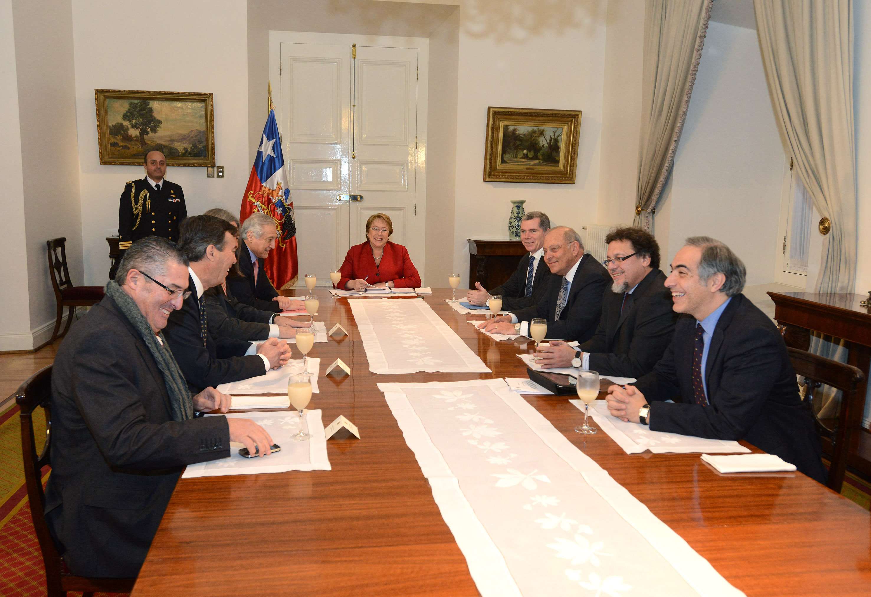 Presidenta se reunió con la Comisión de RR.EE. del Senado para abordar demanda boliviana ante La Haya